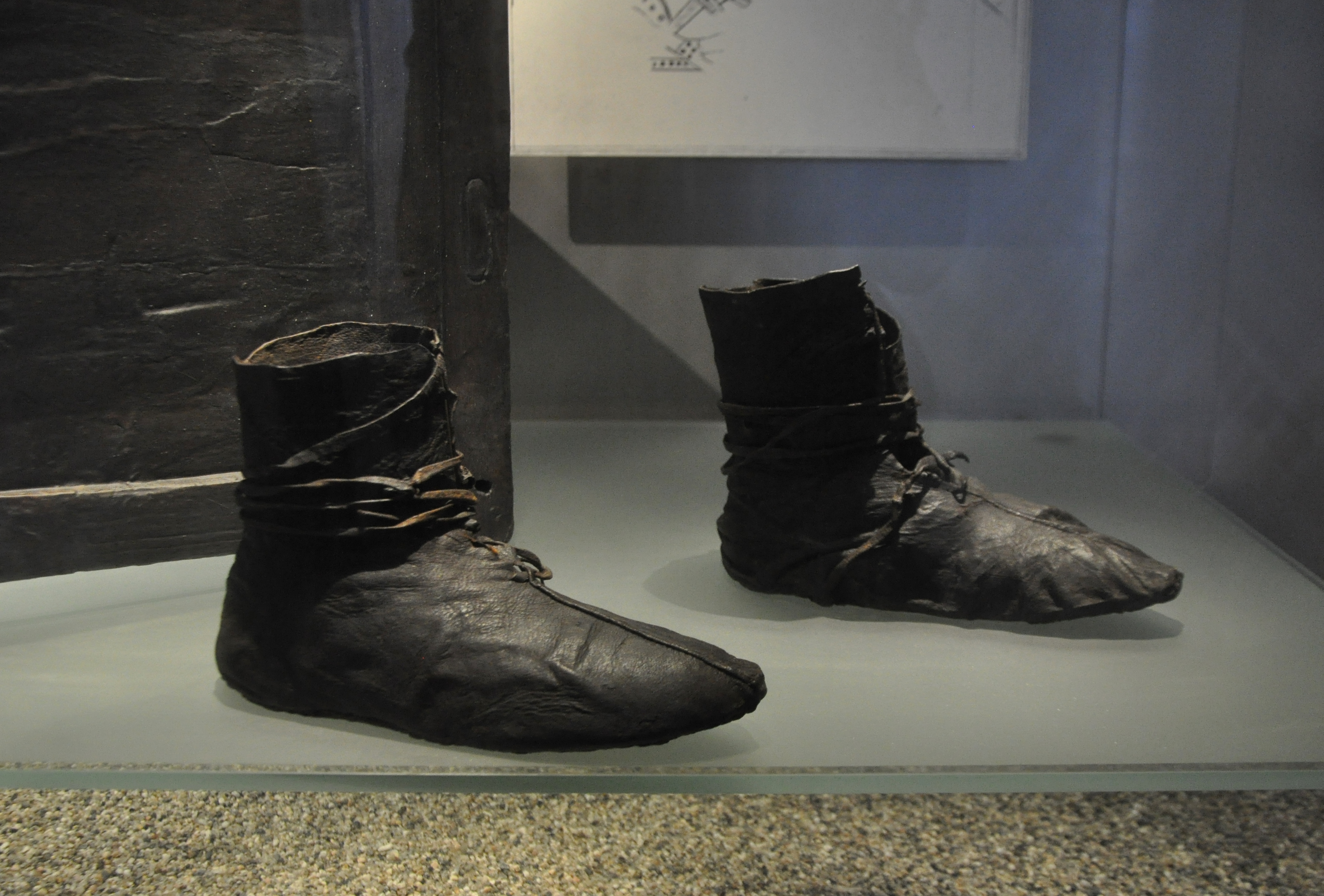 Skor från norsk gravhög, vikingatid, Oseberg, finns utställda i Vikingskipshuset på Bygdøy, Oslo.